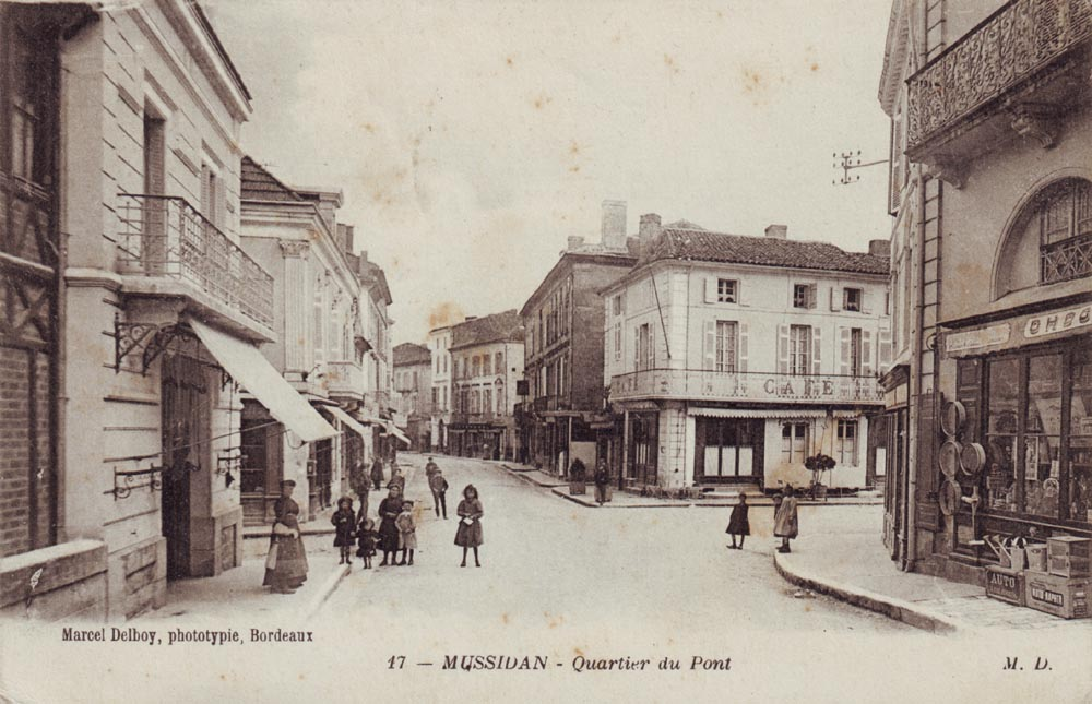 Mussidan zu Beginn des 20. Jahrhunderts - Quartier du pont